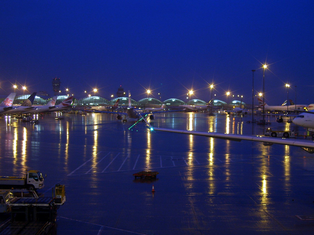 香港国际机场夜景